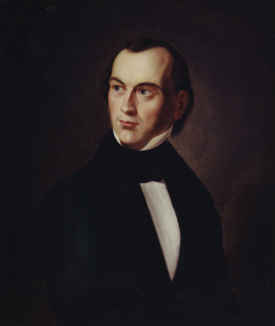 Karl Otfried Müller (1797–1840), deutscher Klassischer Philologe und Archäologe. Ölgemälde von Wilhelm Ternite (1838). Privatbesitz